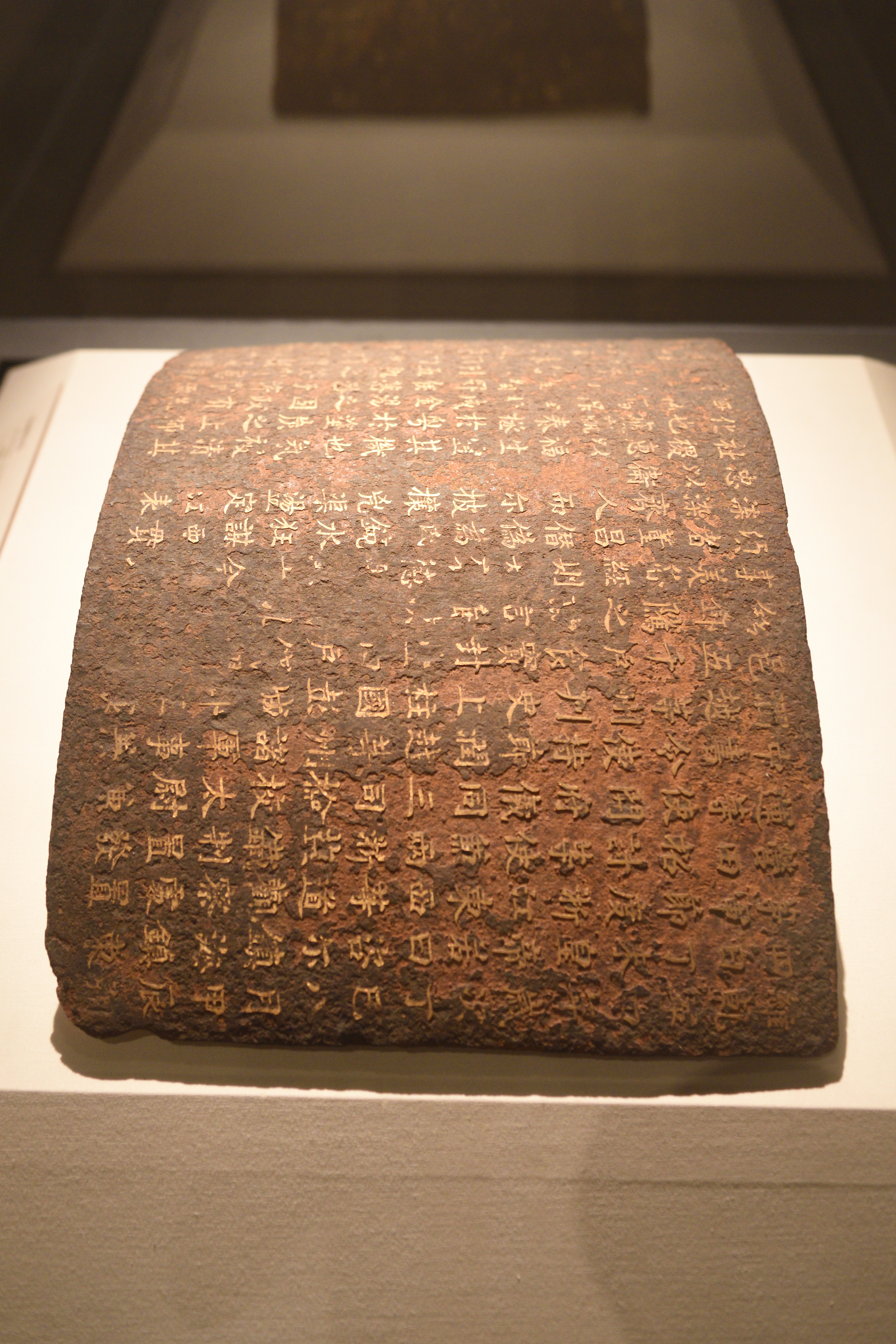 唐代钱镠铁券